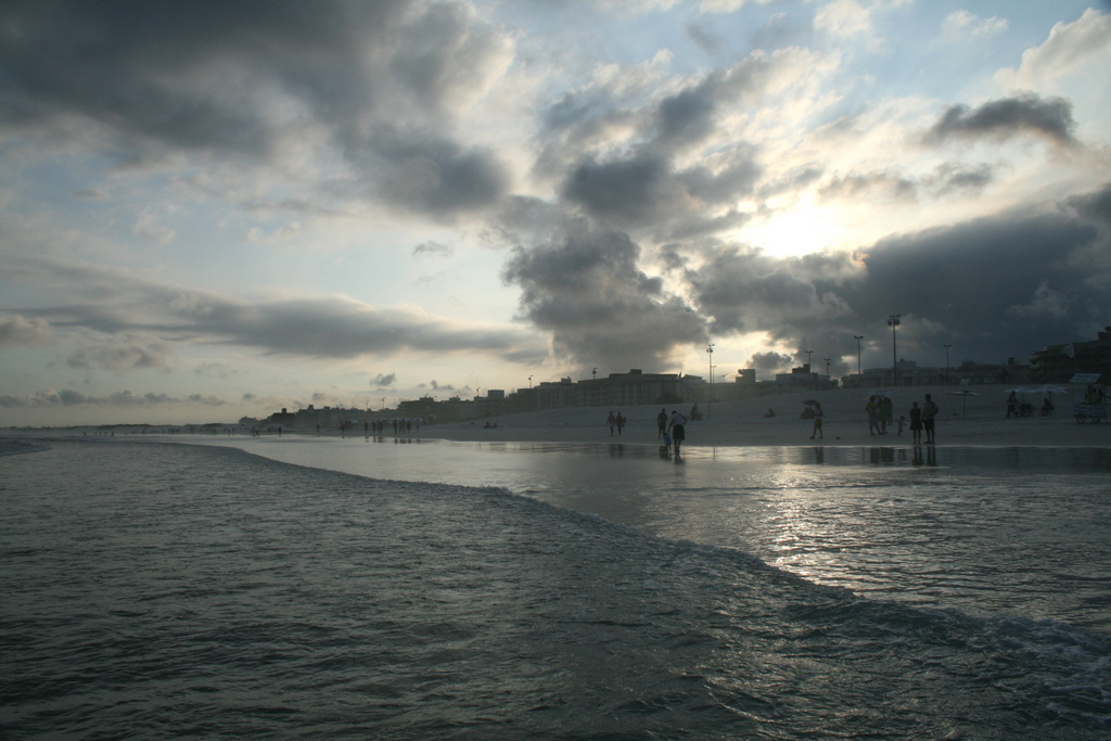 Conmovedora puesta de sol en Praia do Forte